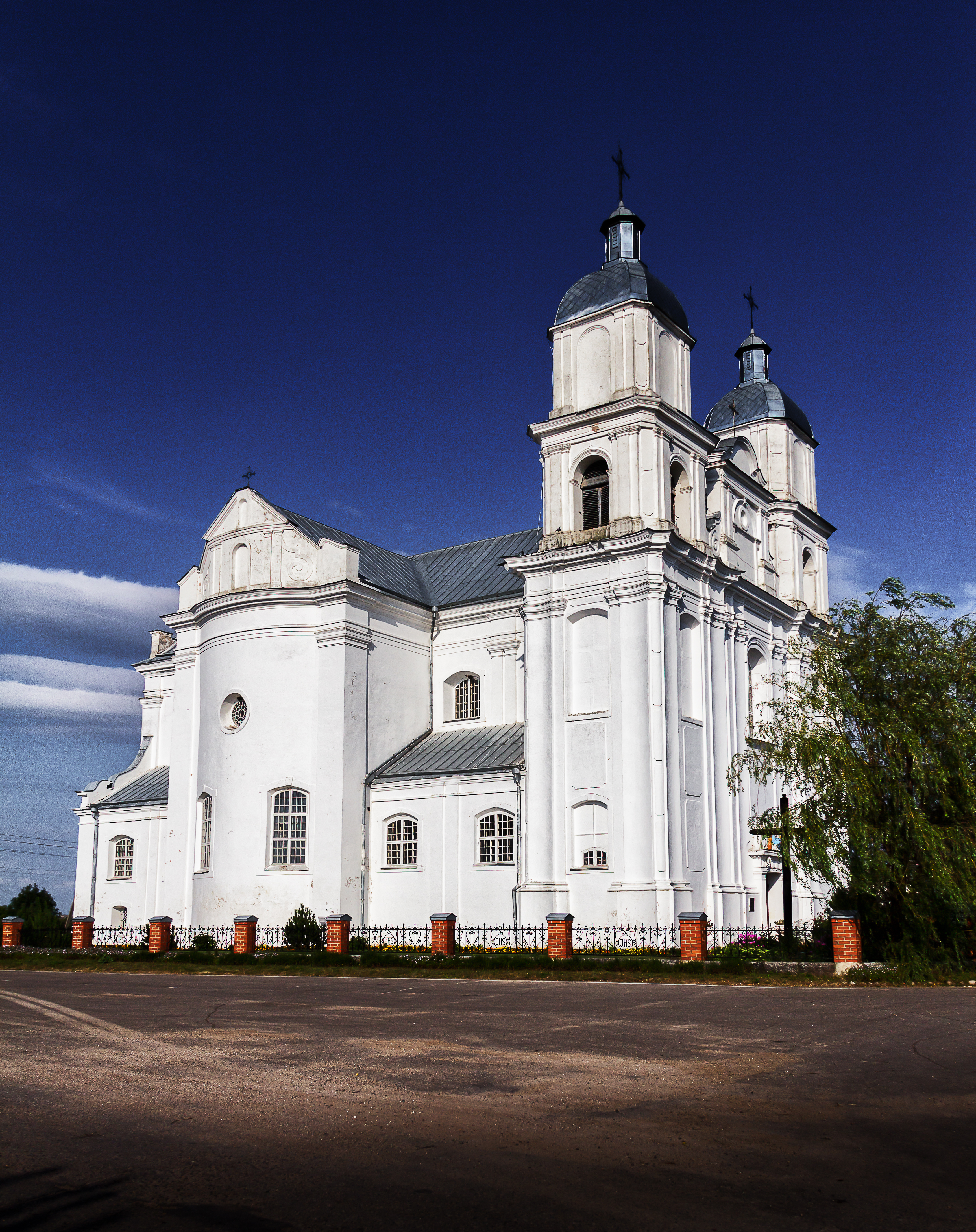 Беларуская (тарашкевіца): Касьцёл Найсьв. Тройцы. в. Дунілавічы